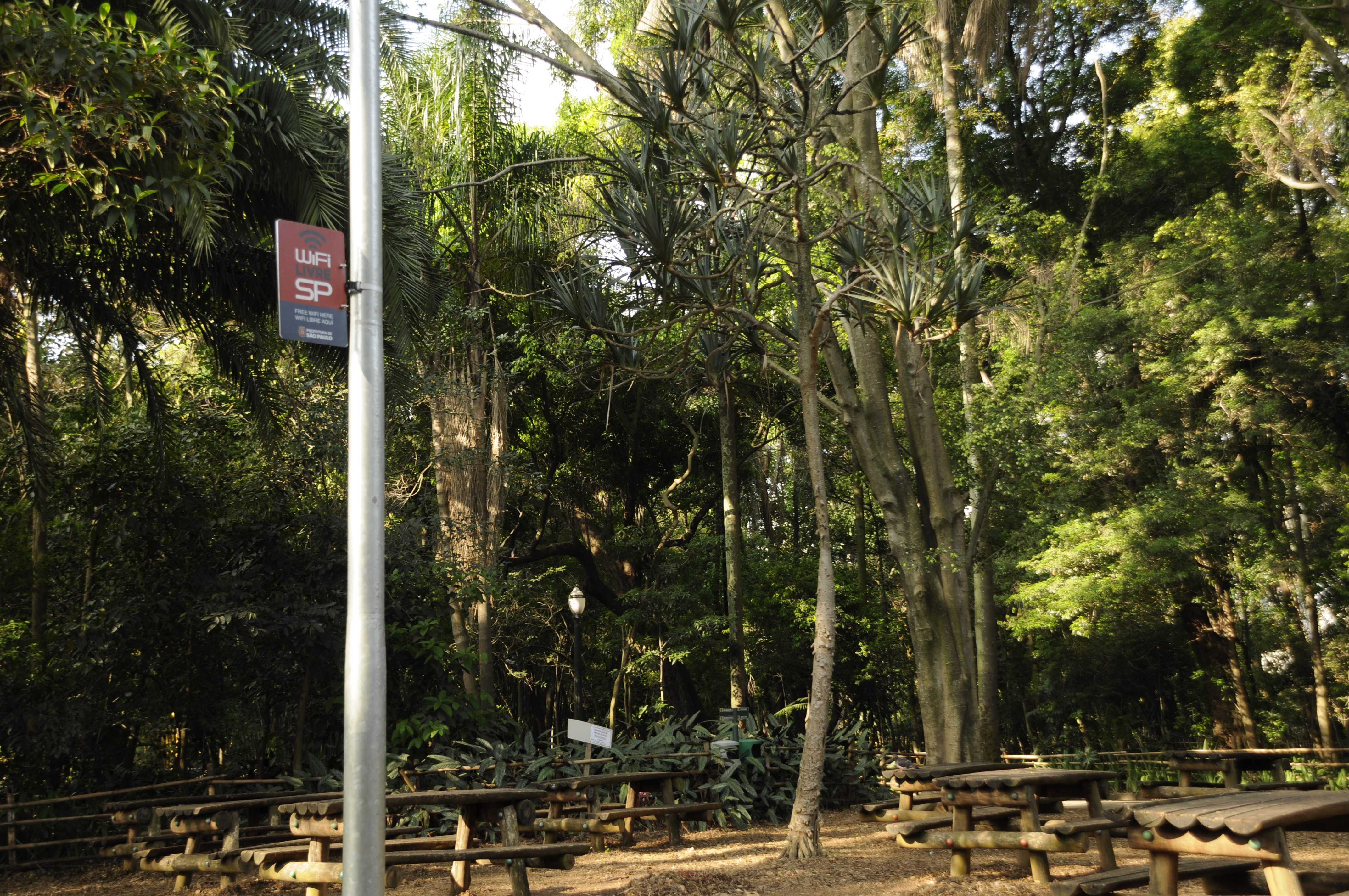 Ponto contemplado pelo Wifi Livre SP com mesas de madeira, dentro do Parque da Independência.